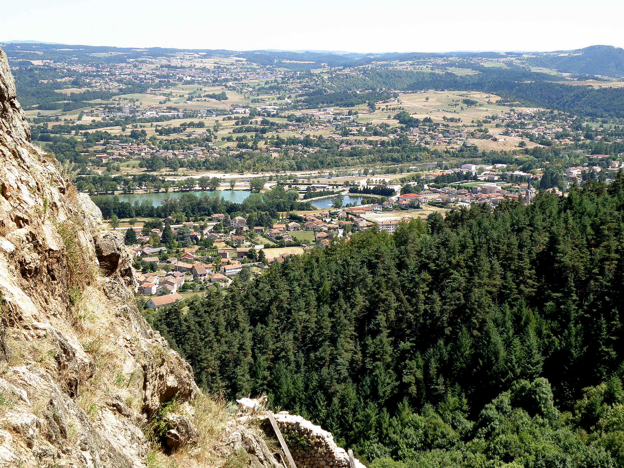 Château de Rochebaron, sis dans la commune de Bas-en-Basset, dép. de la Haute-Loire, France (région Auvergne). Vue sur la localité de Bas-en-Basset depuis le promontoire de Rochebaron. Nous regardons vers le sud-est. À l'avant-plan, on entr'aperçoit une partie du piton rocheux de Rochebaron. Noter la présence, en bas à gauche sur la photo, d'un bouquetin. Derrière le massif de conifères au second plan : l'agglomération de Bas-en-Basset (quartier de Saint-Julien à gauche, et le centre de Bas à droite, dont on voit le clocher de l'église se dresser derrière les arbres du second plan. Entre ces deux parties de l'agglomération : bassin d'épuration). La Loire traverse la photo de part en part, coulant de droite à gauche (c'est-à-dire, dans cette vue, du sud au nord) et derrière les deux étangs au centre. Cependant, la vallée de la Loire se prolonge, plus encaissée, au loin à droite sur la photo, formant une tranchée boisée revenant vers la gauche, puis, plus loin, virant de nouveau vers le bord droit de la photo ; en effet, avant d'atteindre Gourdon, la Loire, après avoir coulé grosso modo d'est en ouest sur 2,5 km, adopte une direction nord en face de Bas-en-Basset. Au-delà de la Loire : quartiers de Basset (à gauche) et de Gourdon (à droite), appartenant également à la commune de Bas-en-Basset. L'agglomération plus importante que l'on remarque dans le lointain, près de la ligne d'horizon à gauche, est la ville de Monistrol.